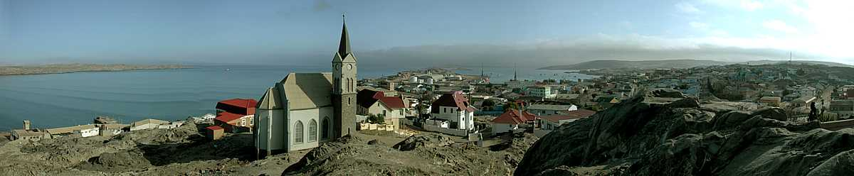 View of Lüderitz with Felsenkirche